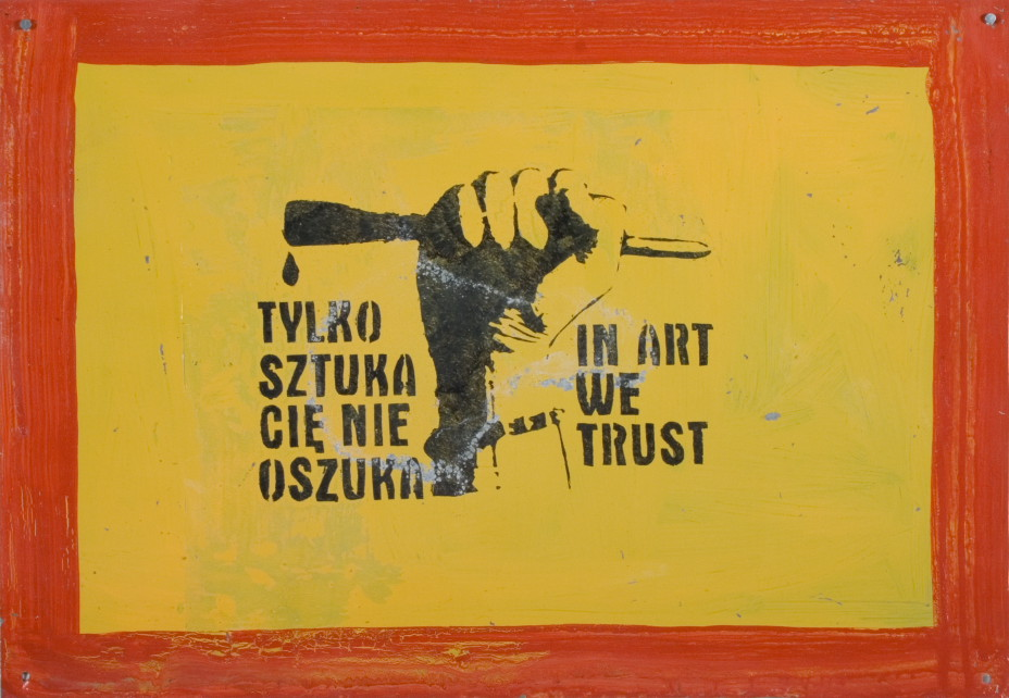 "Tylko sztuka Cię nie oszuka" - work by Paweł Jarodzki, from the permanent collection of Zachęta National Gallery of Art (Warsaw, Poland)